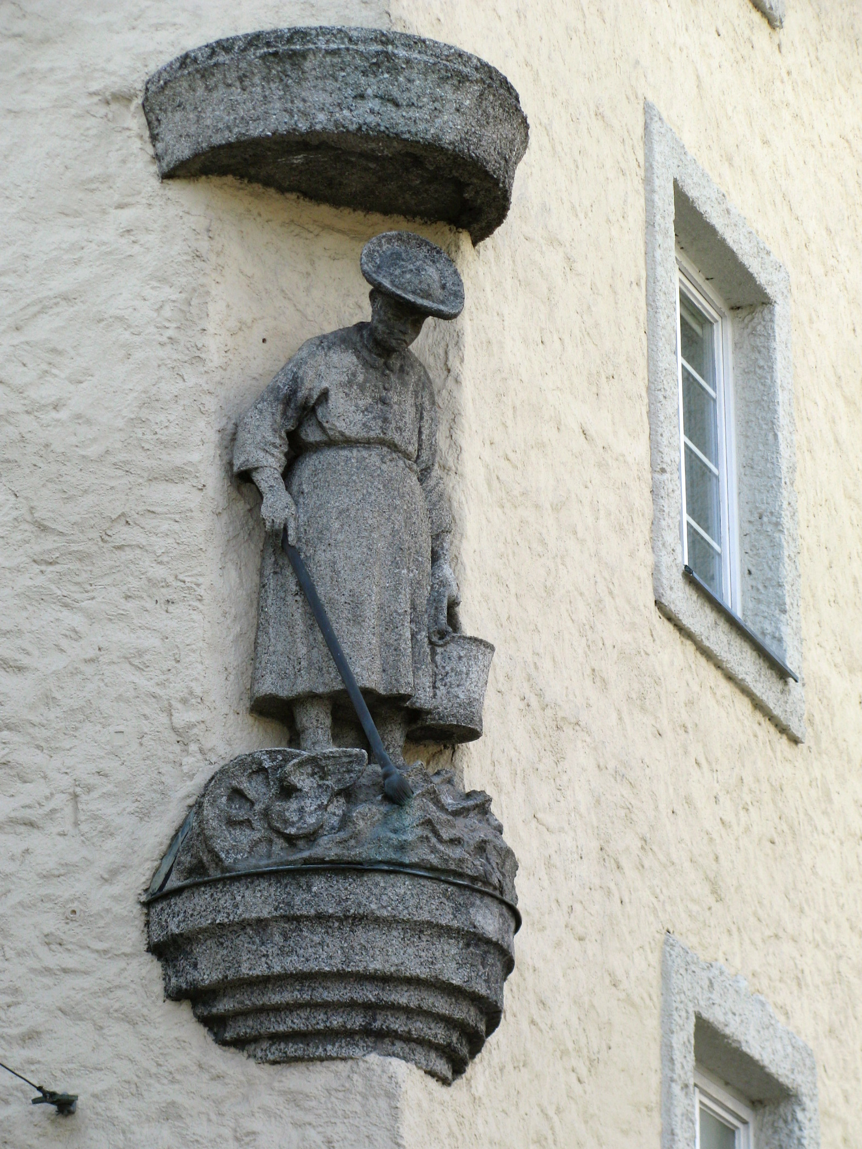 Figur aus Stein einer „Trambahnschienenritzenreinigerin“ an der Hausfassade Einsteinstraße/Seeriederstraße 1 in München.